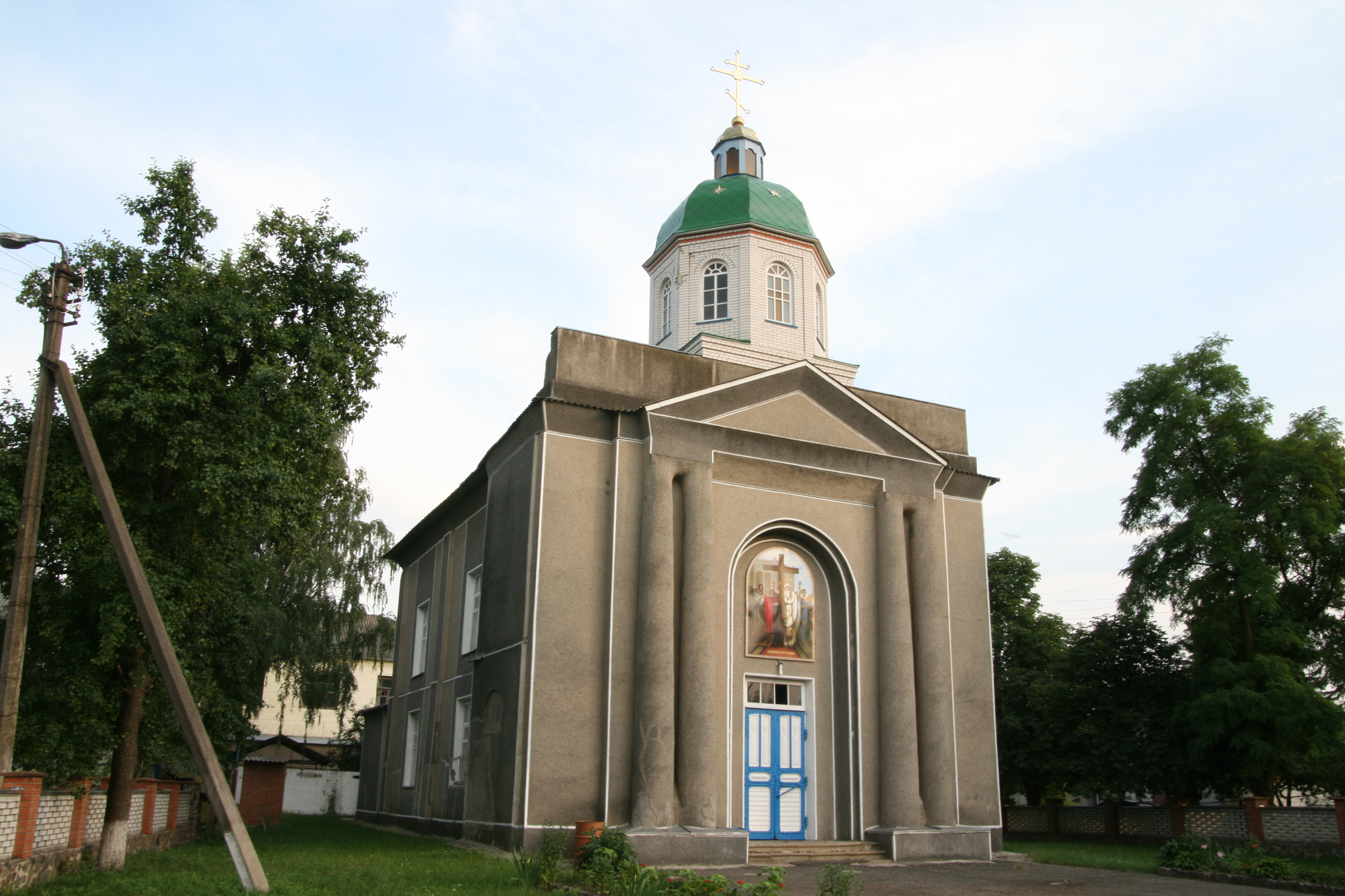 Костьол Св. Миколая (мур., 1826, за ін. даними, 1815). Згодом православна Хрестовоздвиженська церква. Смт Володарка.